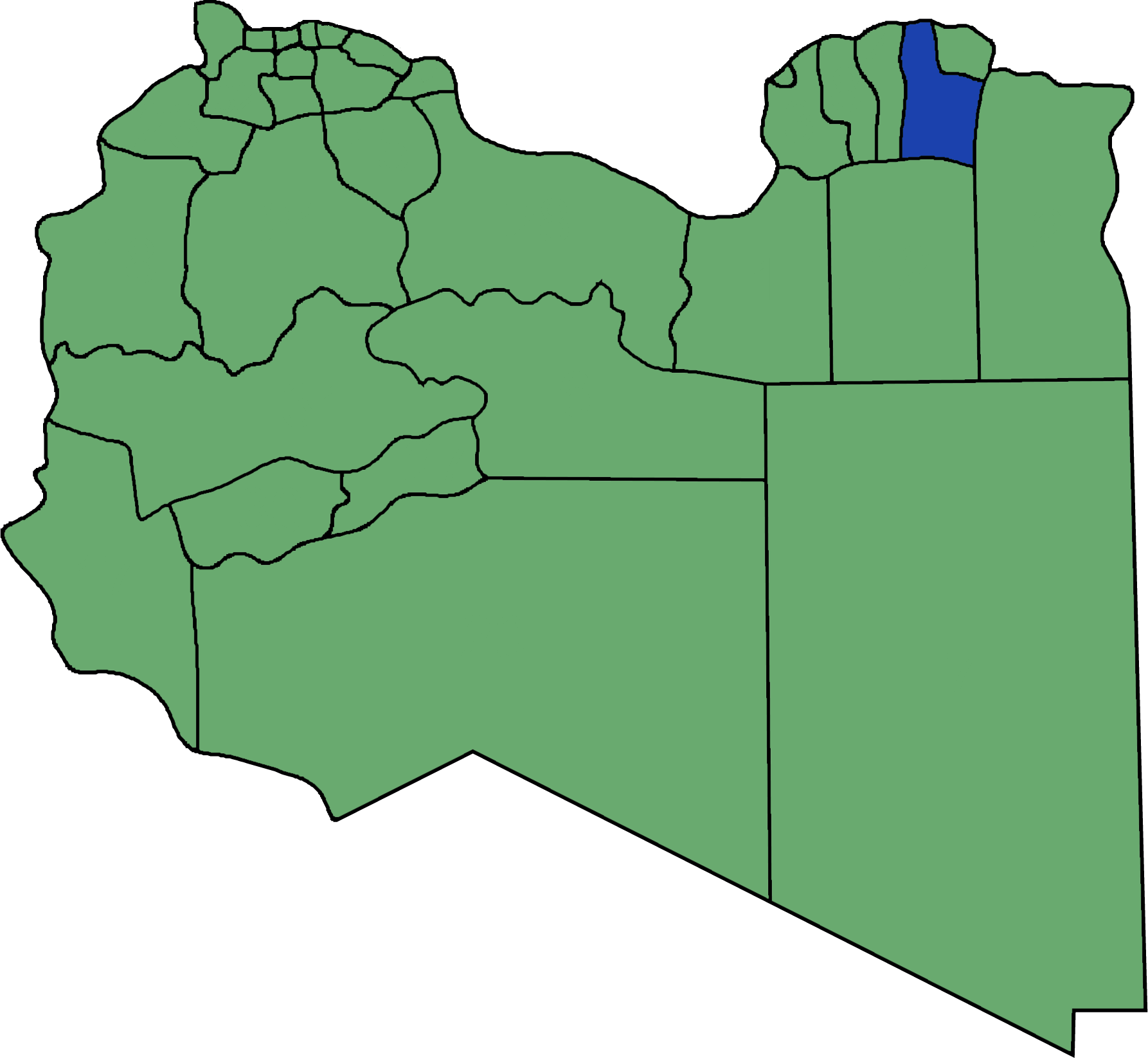 Die neuen Gemeinden (Munizipien) in Libyen. Al Qubah hervorgehoben.